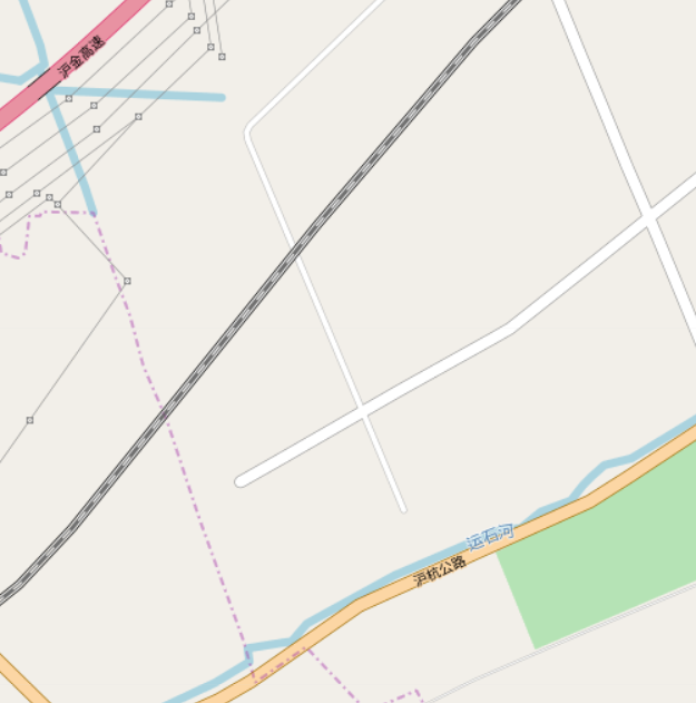 奉贤区柘林镇漴缺（Shuangque）的地图。该地区现在是上海化学工业区北区。